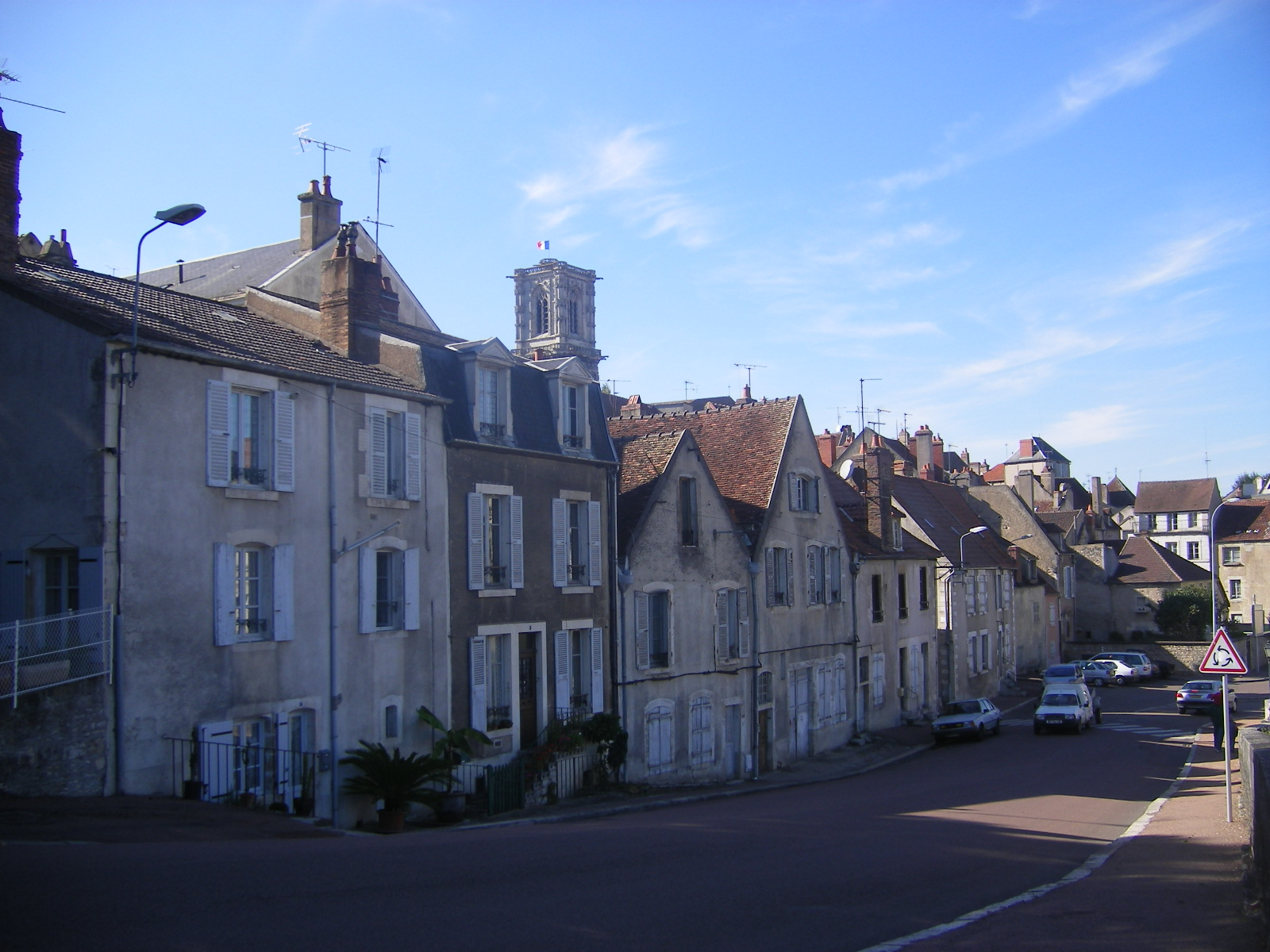 Clamecy